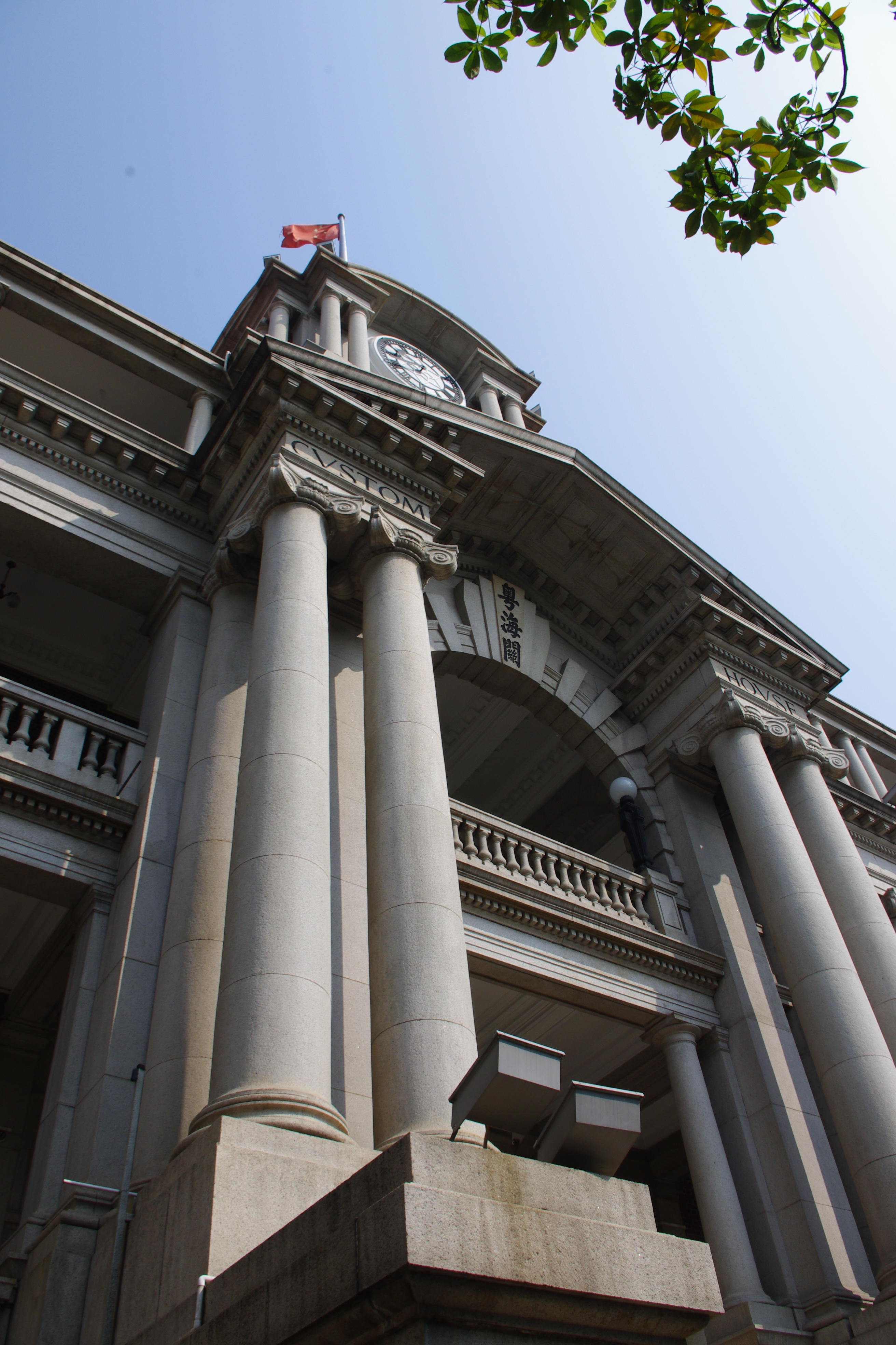 广州粤海关旧址